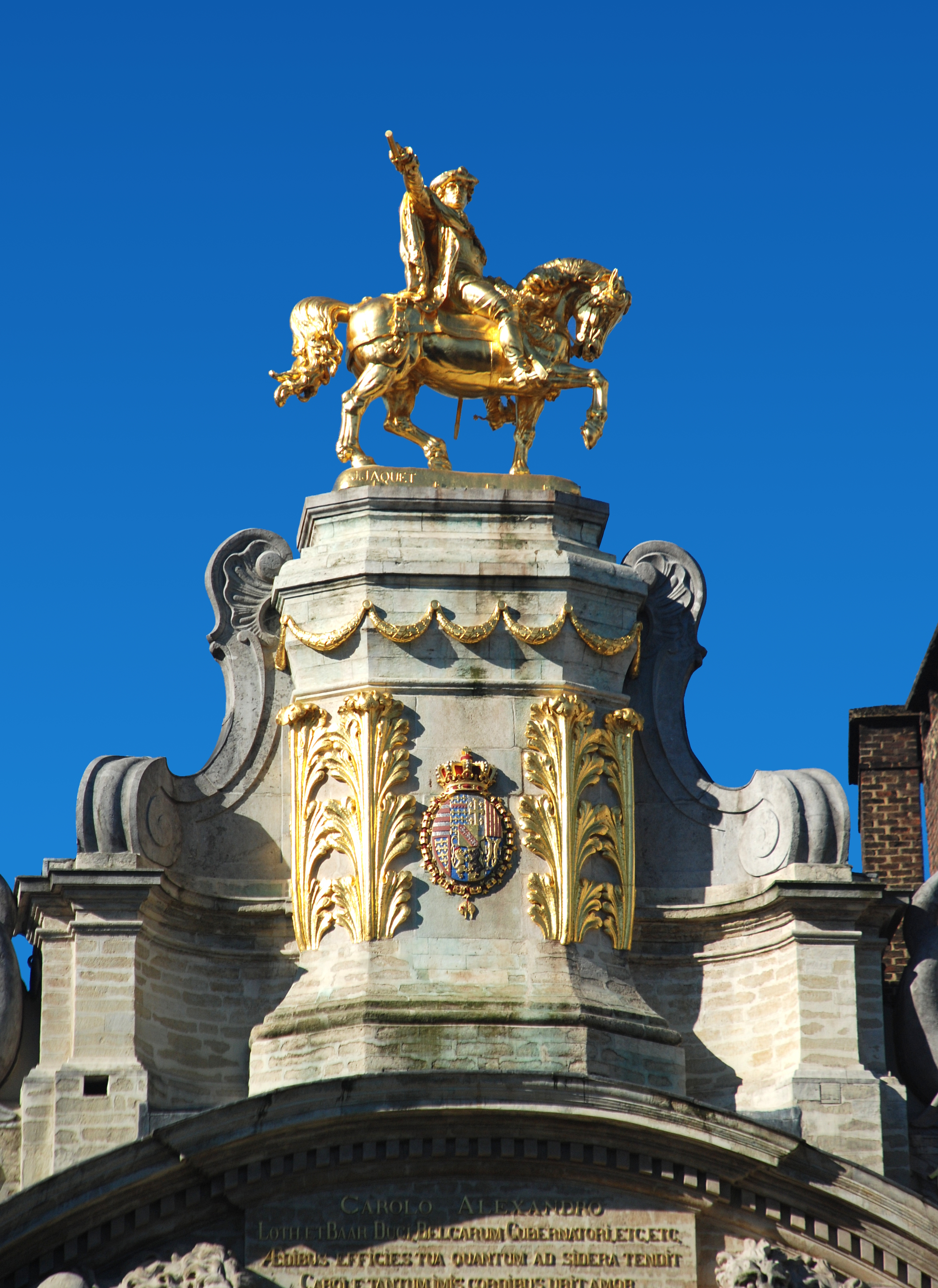 Belgique - Bruxelles - Grand-Place - Maison de l'Arbre d'Or (Maison des Brasseurs)